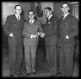 Se ve a los músicos argentinos Julio Rosenberg, Julio De Caro, Luis Díaz y Francisco De Caro.